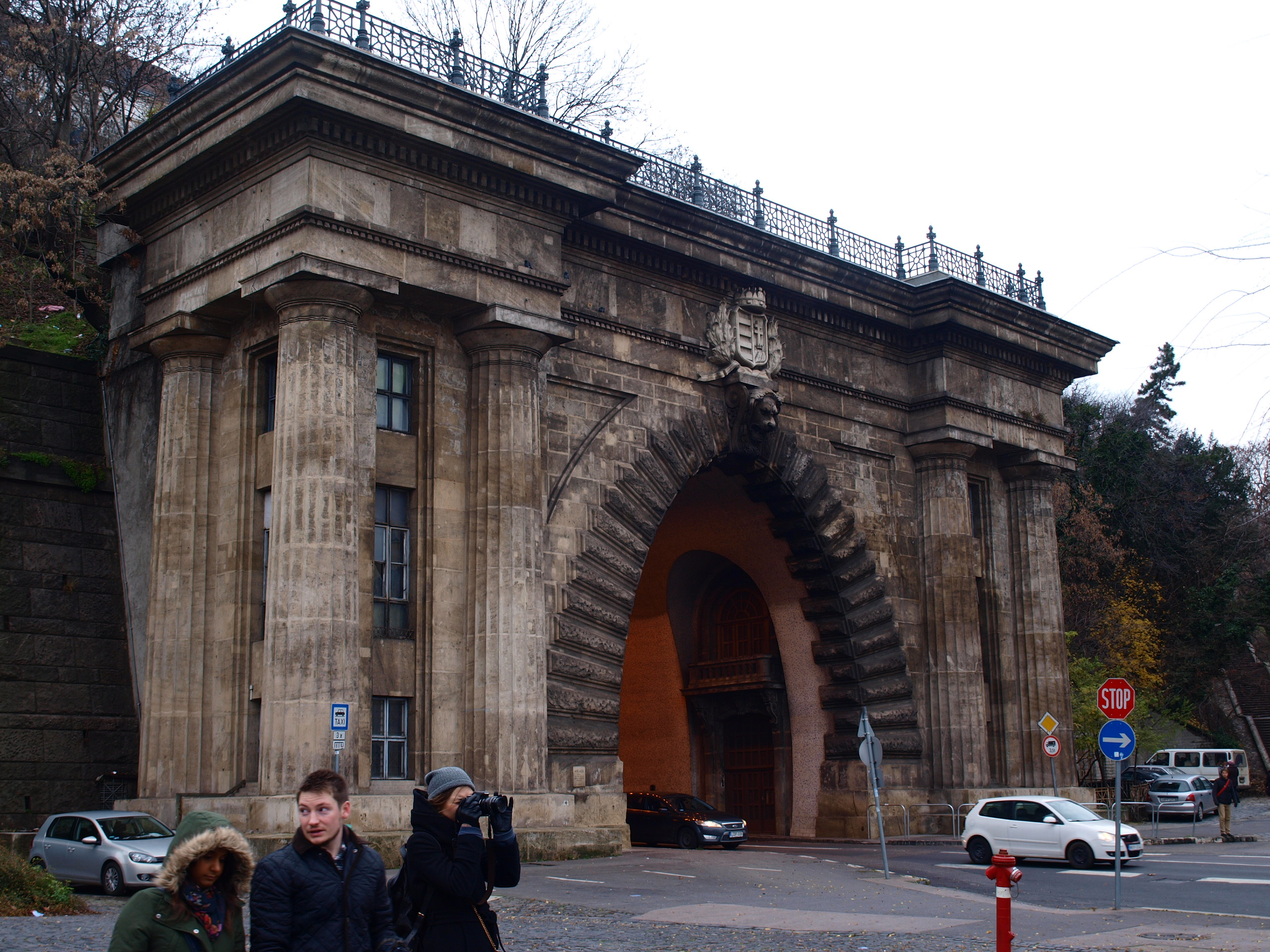 Buda - tunel 2